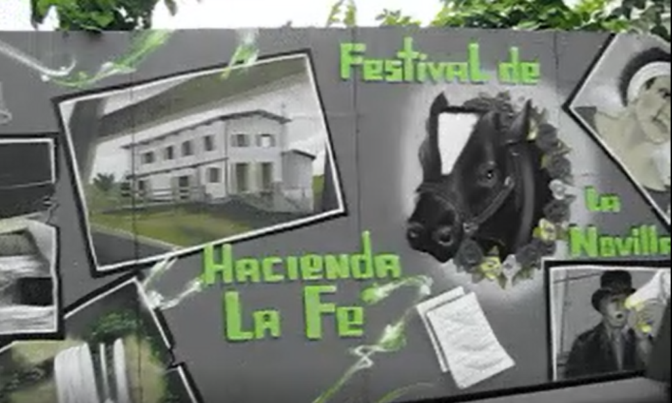 Festival de la Novilla, Hacienda La Fe, San Sebastián, Puerto Rico